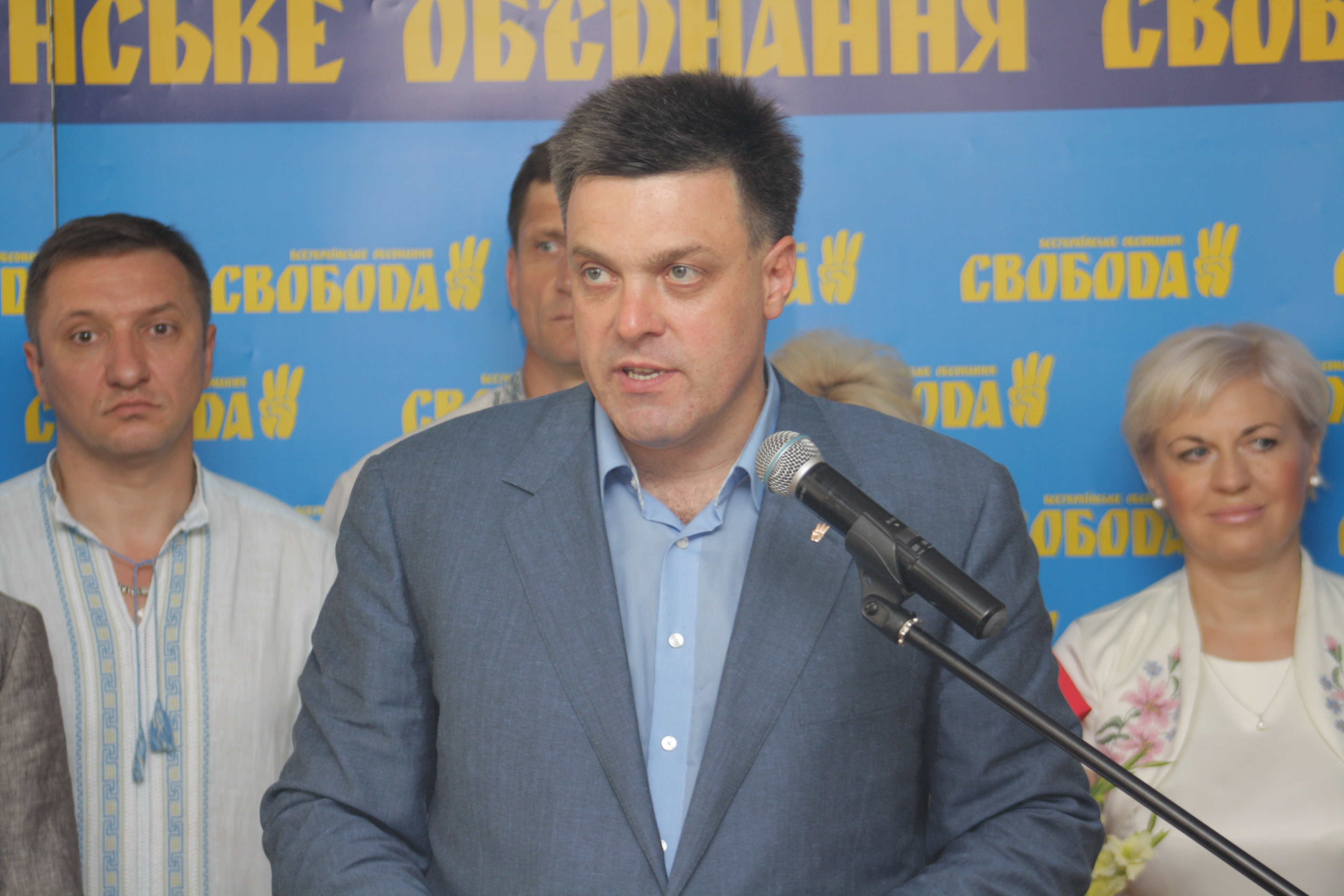 Oleksiy Kaida and Oleh Tyahnybok